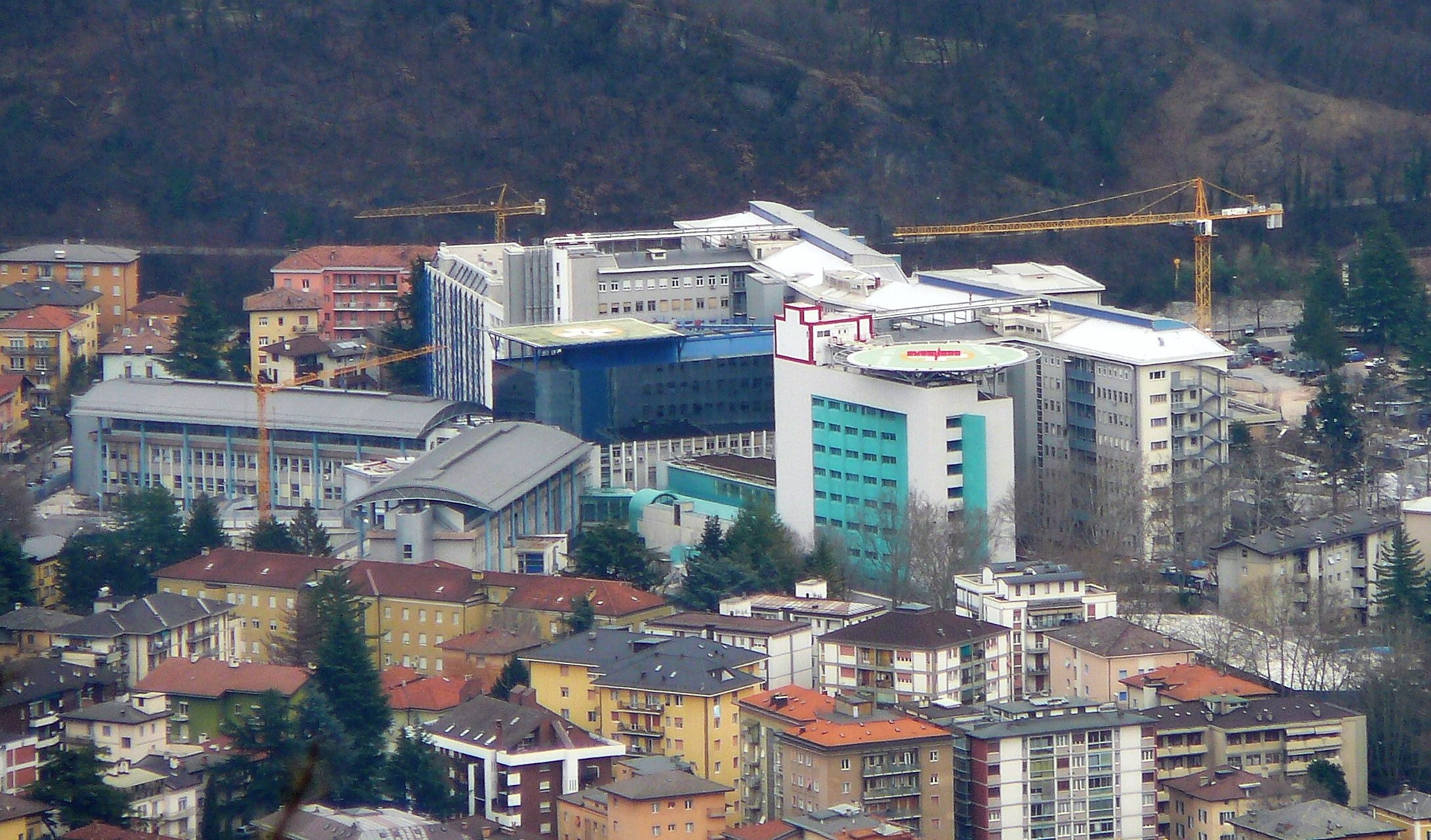 L'ospedale Santa chiara di Trento